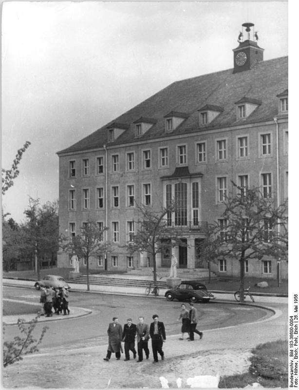 Dresden, Technische Hochschule, Arbeiter- und Bauernfakultät Zentralbild Höhne-Pohl 26.5.1956 Dresden - Zur 750-Jahr-Feier - Anfang Juni 1956 UBz: Die grossartige Entwicklung der Technischen Hochschule mit seinem Arbeiter- und Bauernstudium, Fernstudium und der beispiellosen Entwicklung des Stipendienwesens war erst in unserem Arbeiter- und Bauernstaat möglich. An der Arbeiter- und Bauernfakultät Dresden (im Bild) studieren 1400 ABF-Studenten.